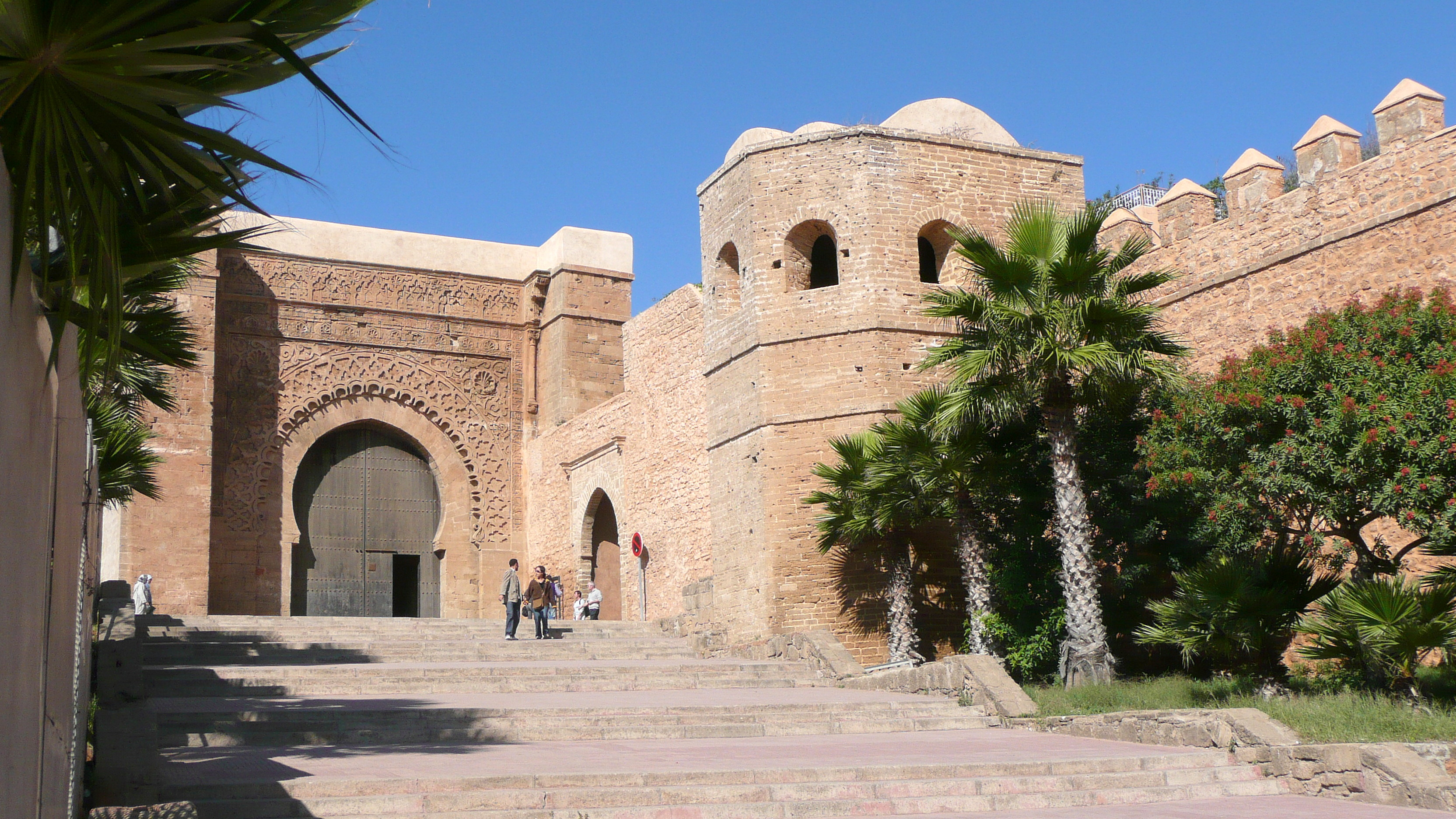 Bab Oudaïa porte de la Kasbah des Oudaias (Rabat, Maroc)